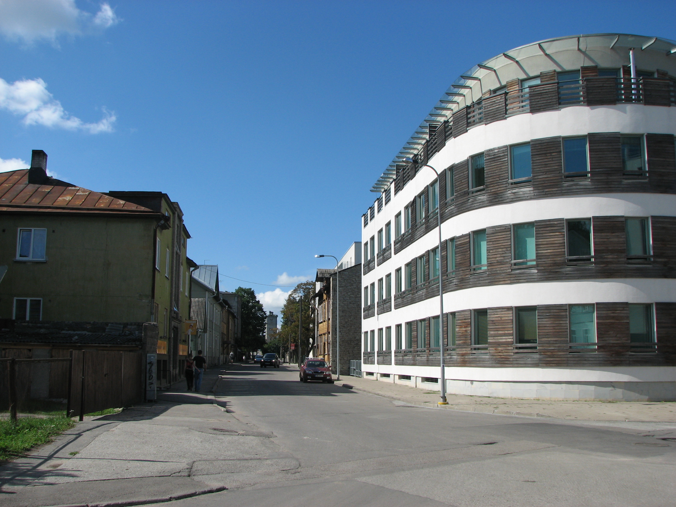 Vaade Herne tänavale Magasini tänava ristmikult